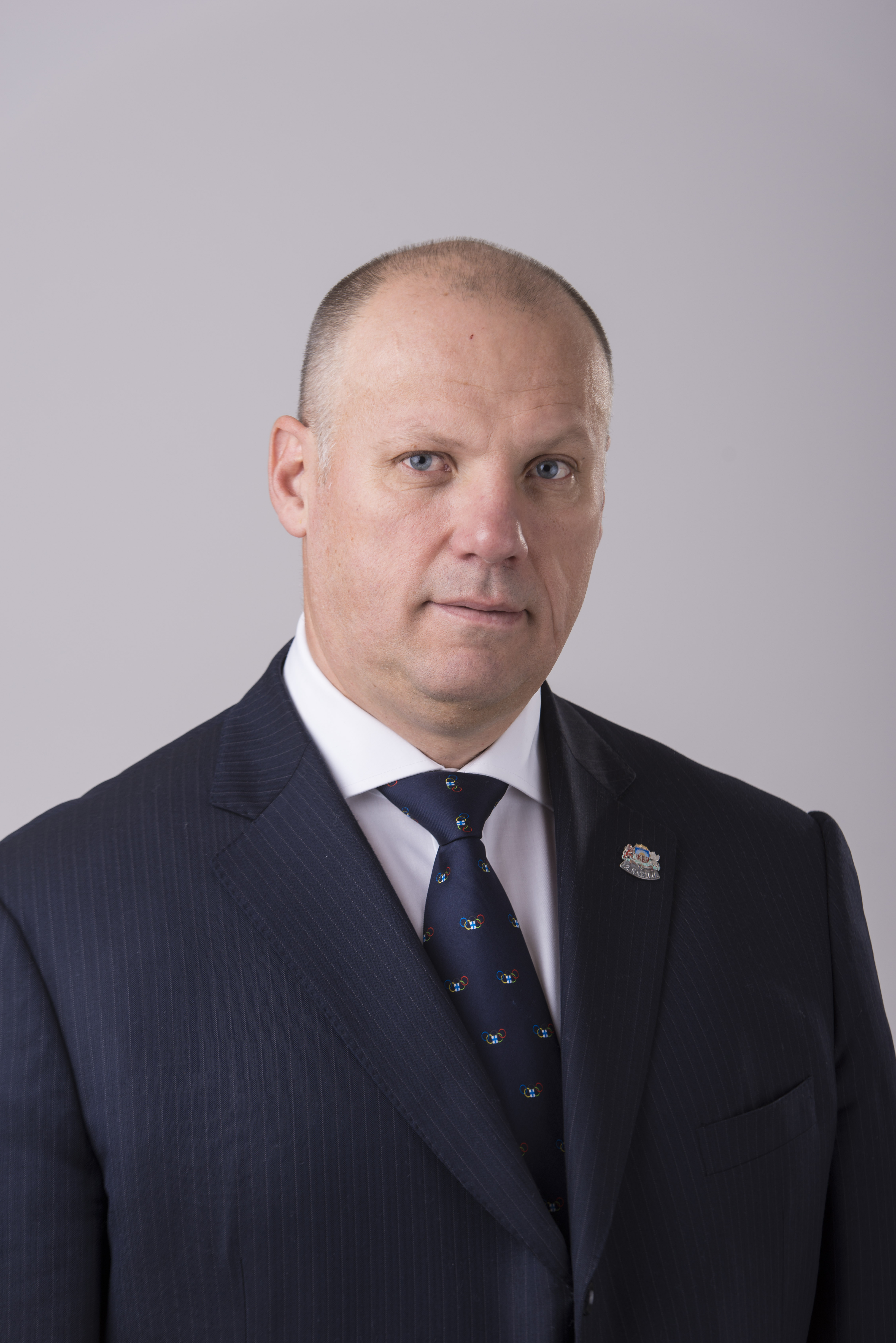 2014.gada 9.decembris. 12.Saeimas deputāts Raimonds Bergmanis. Foto: Reinis Inkēns, Saeimas Kanceleja Izmantošanas noteikumi: saeima.lv/lv/autortiesibas